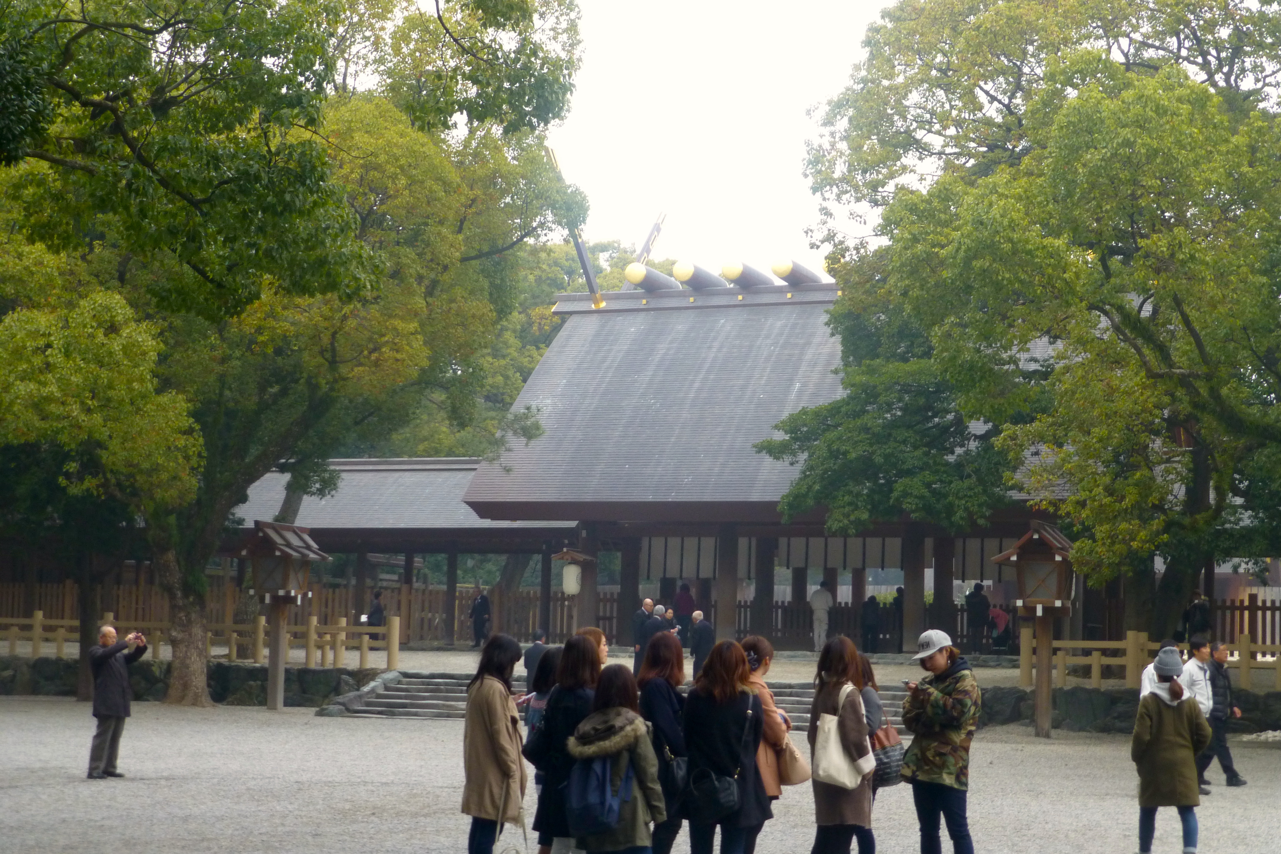 Atsuta Shrine (熱田神宮本宮)